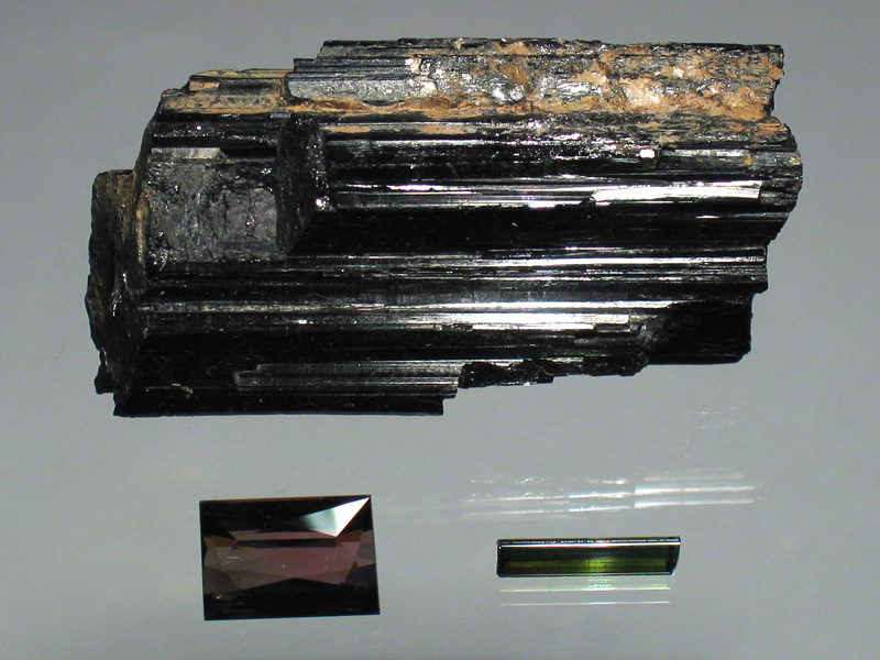 Erilaisia turmaliineja. Ylhäällä schörlkide Rovaniemeltä, pituus 56 mm; alavasemmalla viistehiottu kaksivärinen turmaliini, paino 11 karaattia; alaoikealla verdeliittikide.